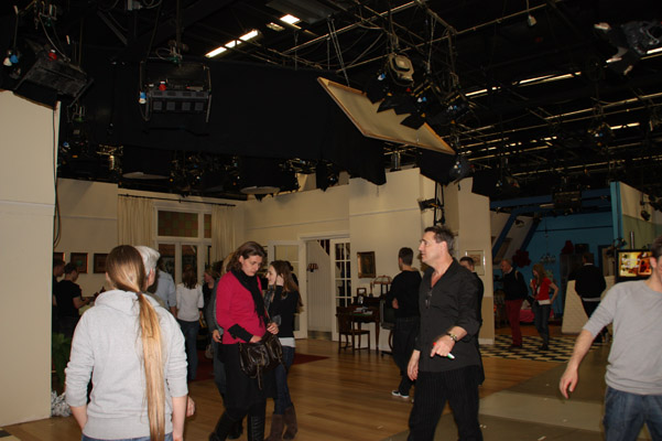 De studio van 'Kinderen geen bezwaar' na een opname